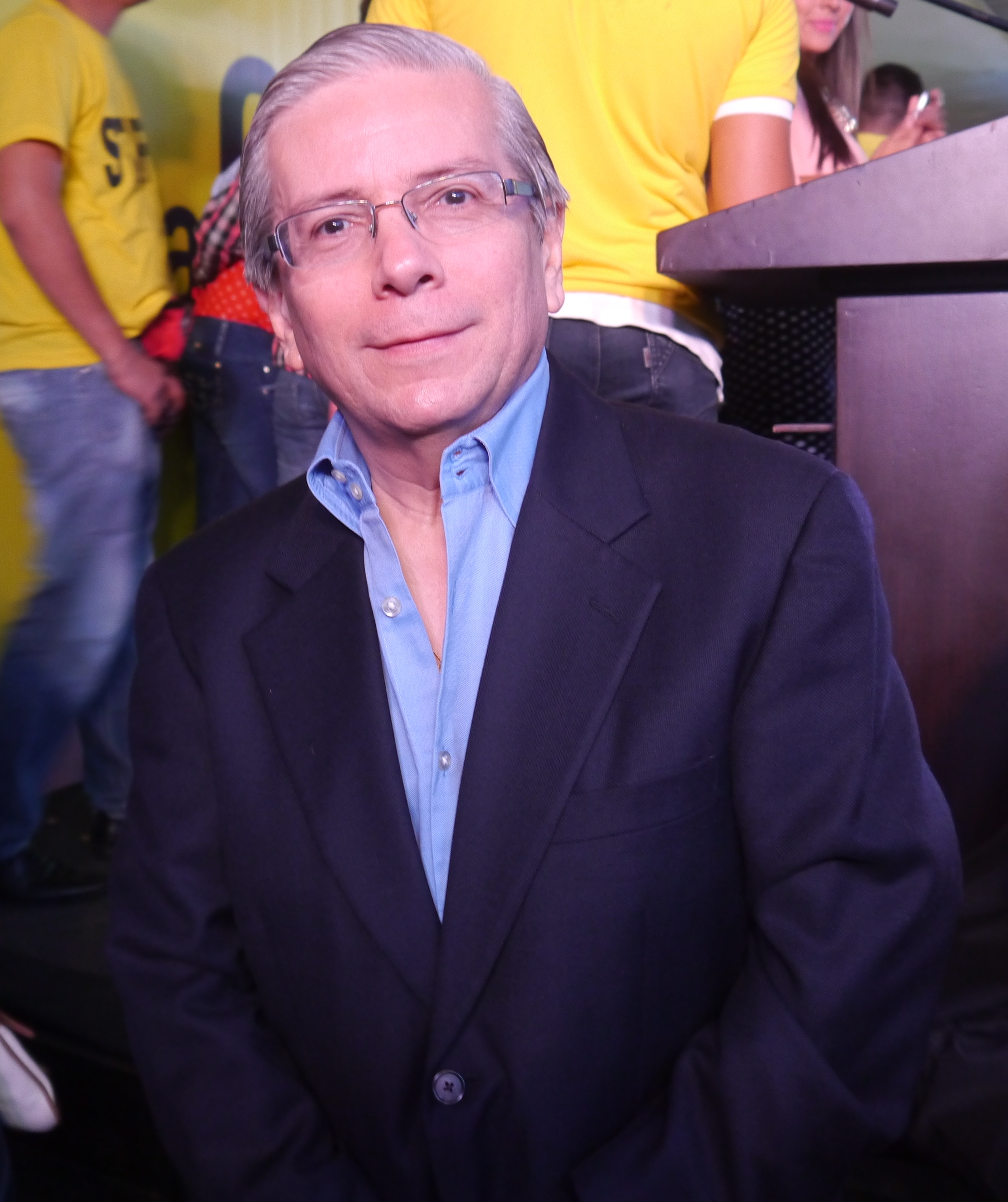 Pascual del Cioppo en evento de lanzamiento de La Cantera de la 6 en Guayaquil.